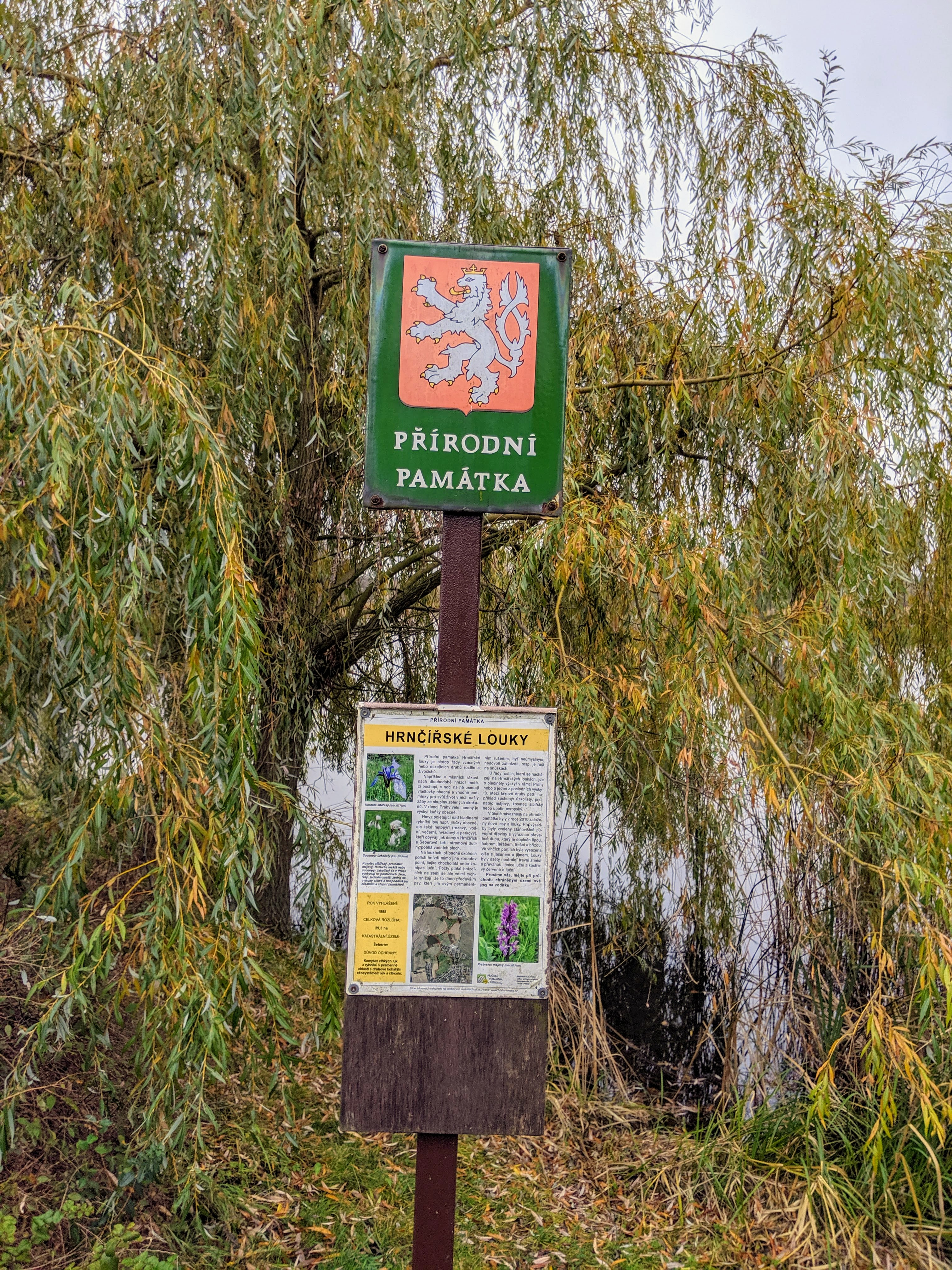 Pohled na ceduli označujicí přírodní památku Hrnčířské louky, v pozadí vrba.